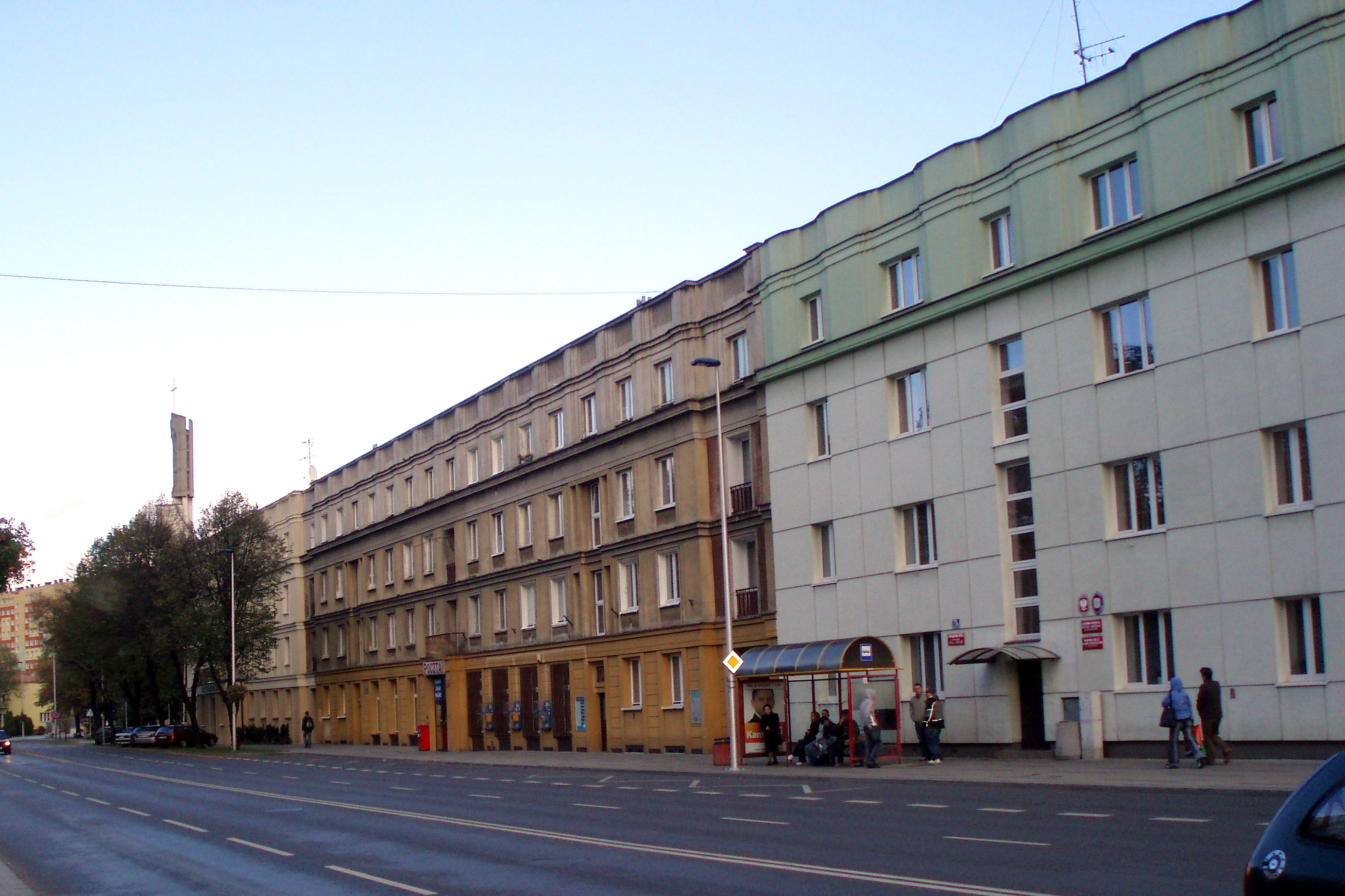 Fragment ulicy Dąbrowskiego z zabudową z lat przed- (budynek na pierwszym planie) i powojennych, w tle widoczne Sanktuarium Matki Bożej Saletyńskiej, którego budowę ukończono w 1999 oraz fragment 10-piętrowej "szafy".